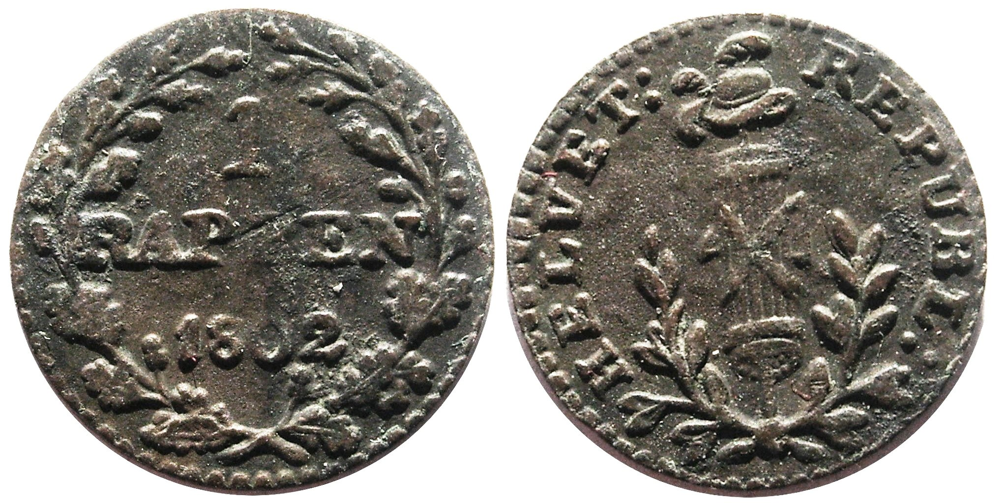 Description 1 rappe république helvétique Date10 April 2009SourceOwn workAuthorJ. Courtois File:1raprephelv1802.jpg 1 rappe république helvétique